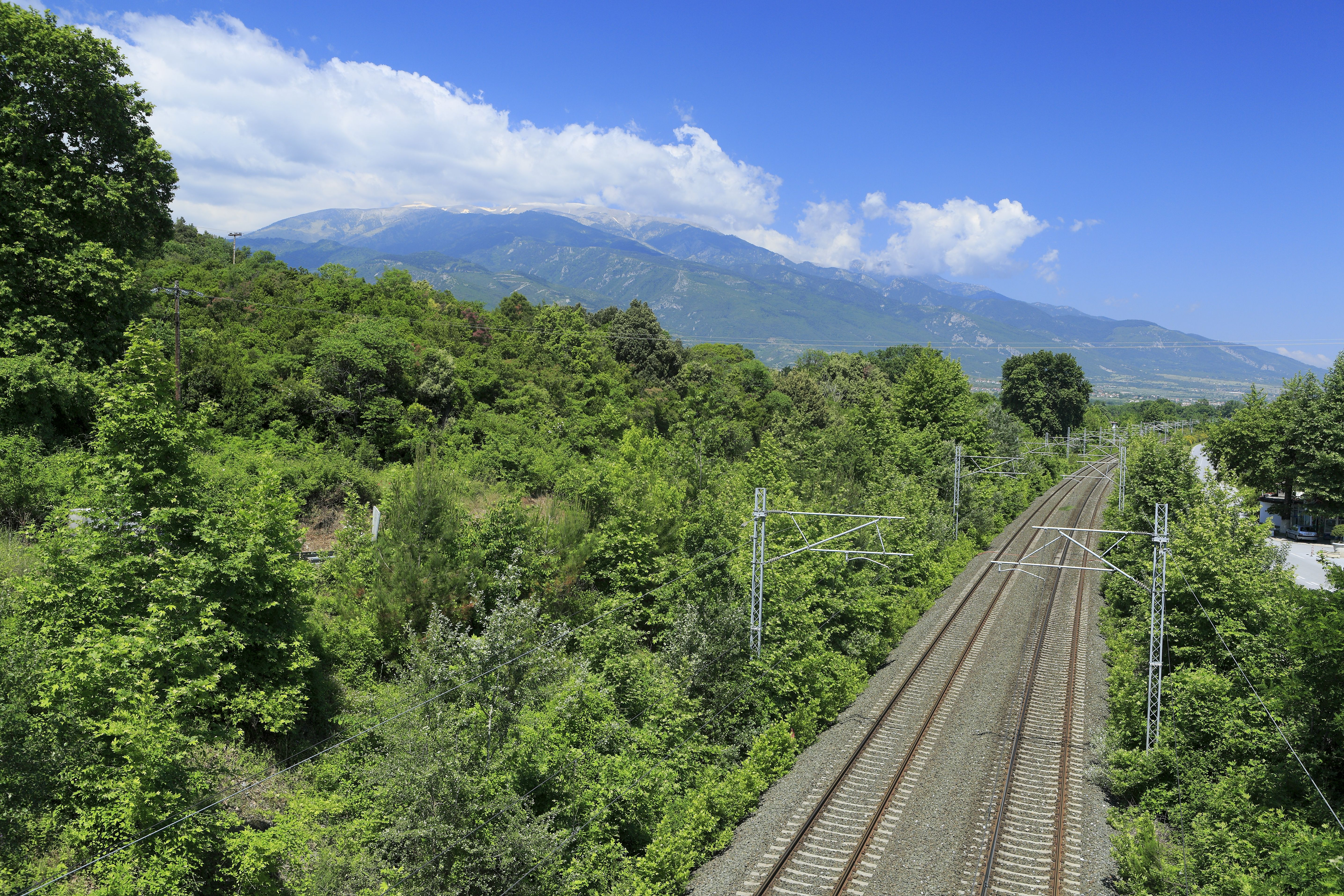 Neubaustrecke von etwa 2000 Thessaloníki–Athína Richtung Thessaloníki, von der Fußgängerbrücke bei Paralía Pandeleímona. Links im Hintergrund liegt das Olimbos-Gebirge.